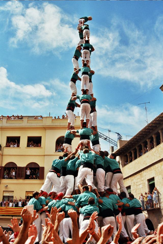 3 de 10 amb folre i manilles carregat pels Castellers de Vilafranca a la diada de Sant Fèlix del 2006.